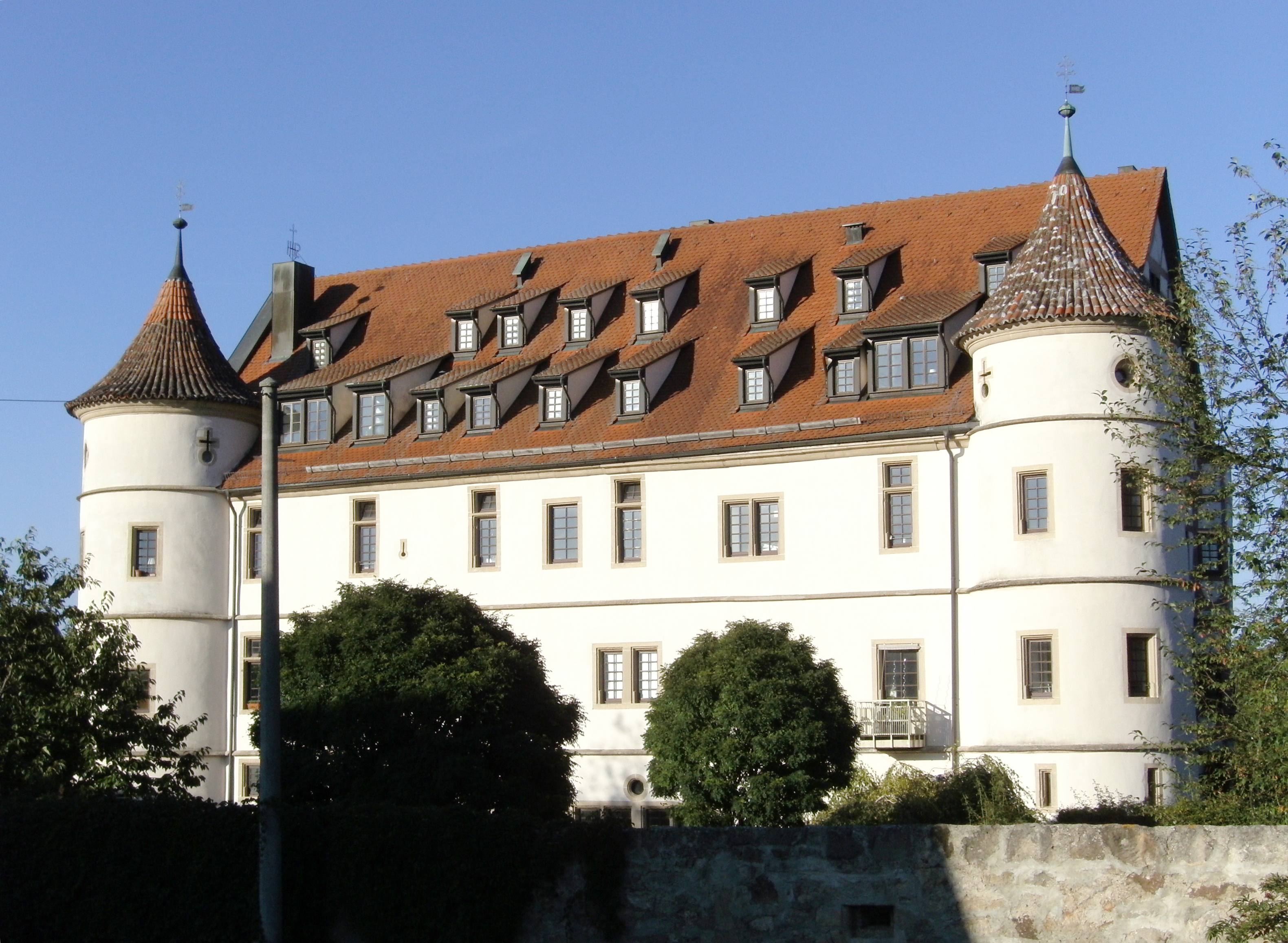 Schloss Bühl, Tübingen